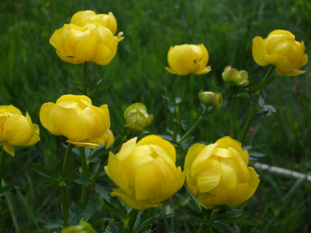 Trollblume am Ostersee